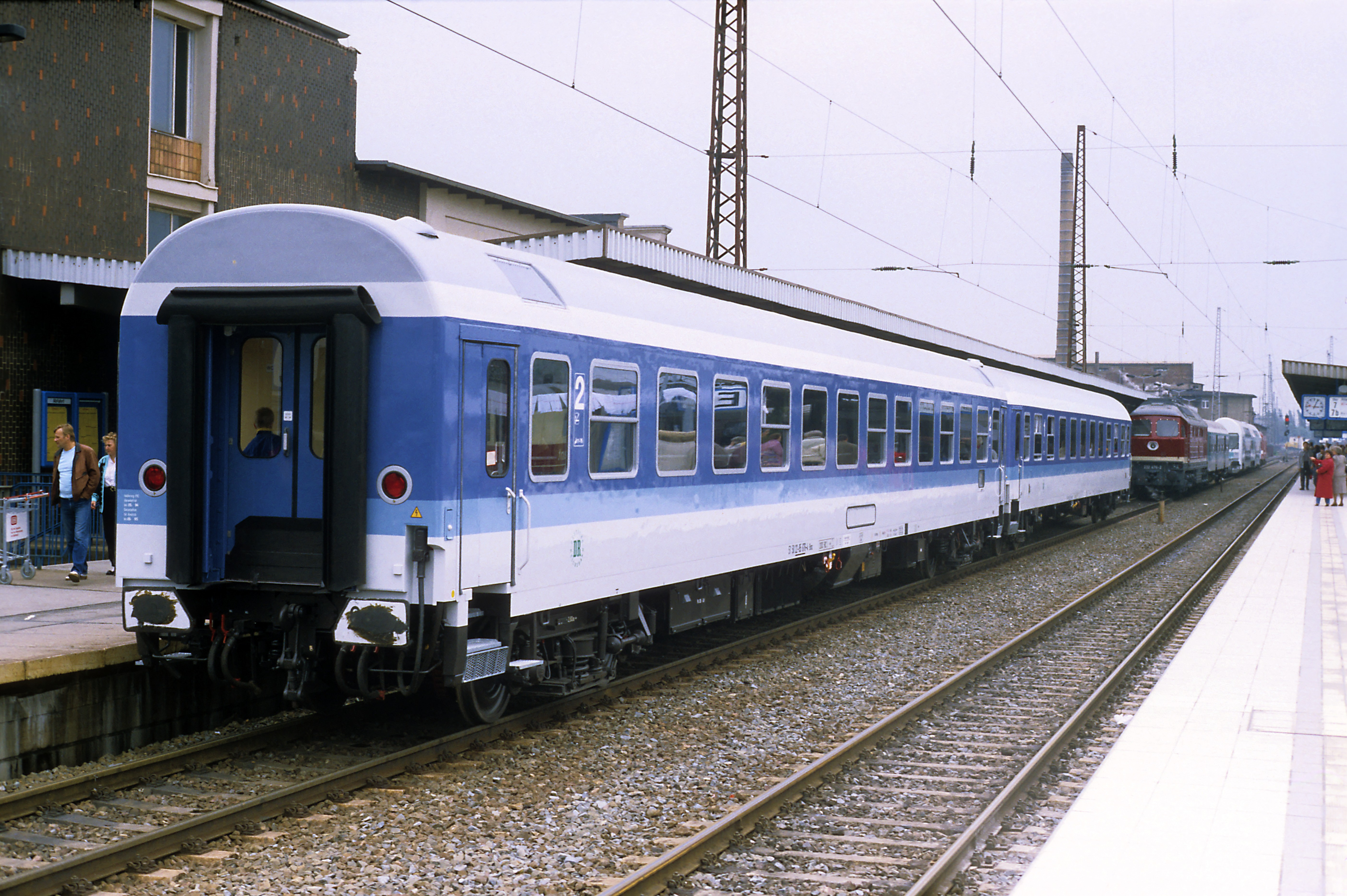 Interregiowagen der DR, aus Halberstädter Z-Wagen umgebaut. Fragwürdig ist die Abteilkürzung um 10 cm (1800 statt der ursprünglichen 1900 mm). Markante Unterschiede zur Ursprungsbauart sind die geänderten Einstiege mit klappbarer unterer Trittstufe, die hochgesetzten Schlusssignallampen und die verstärkten Übergangstüren mit Öffnungshilfe.